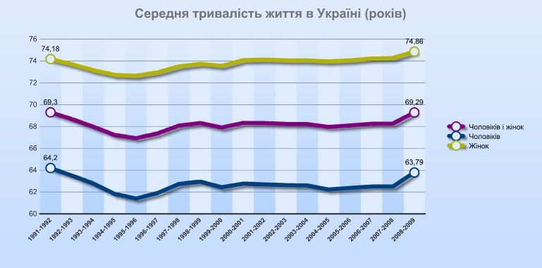 Середня тривалість життя в Україні.: Динаміка зміни середньої тривалості життя населення України (1991-2009)р.р.